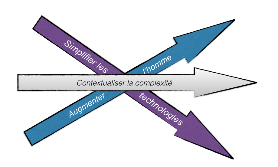 Les 3 sources thématiques de la Cognitique ou des Sciences Cognitives Appliquées.